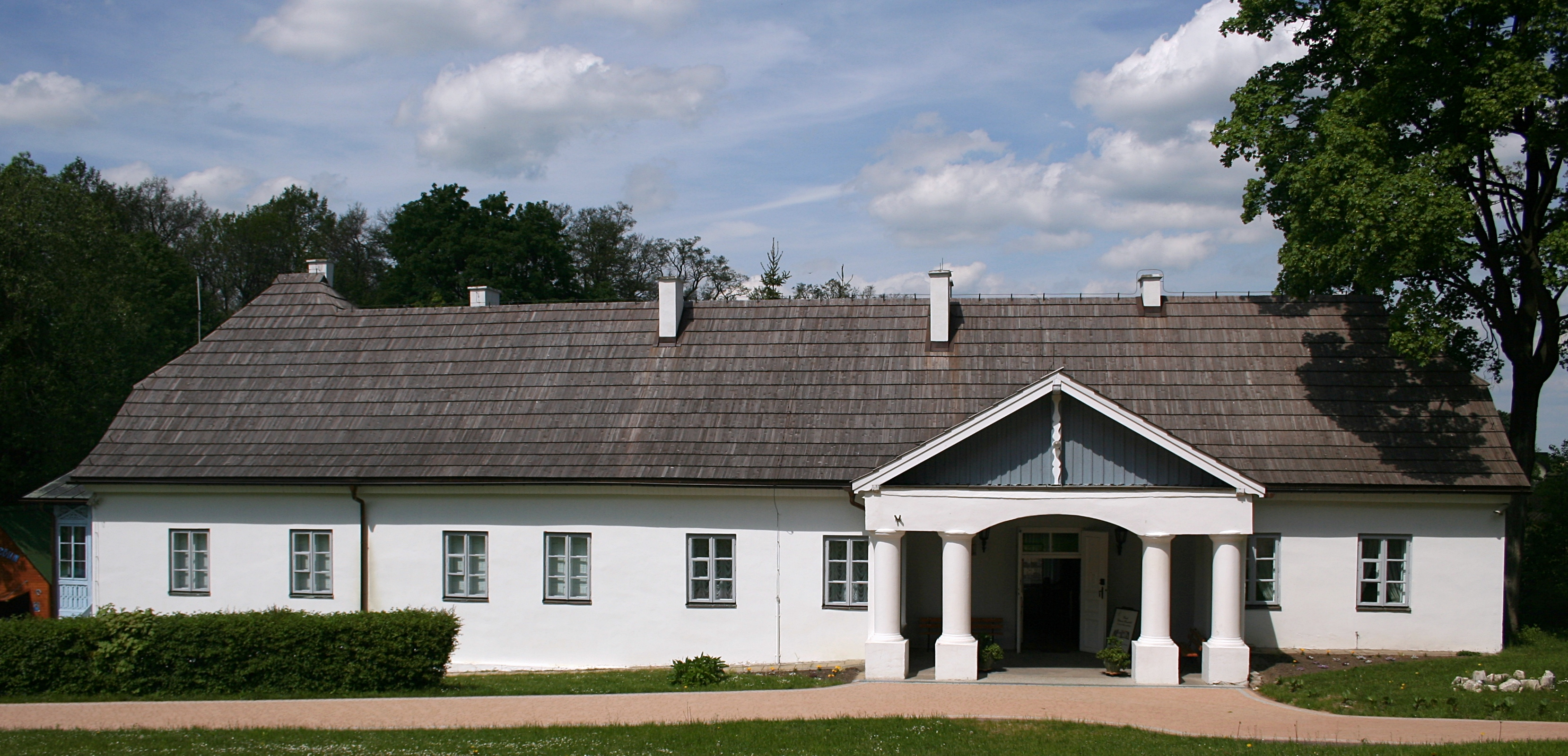 Dwór Krasińskich, siedziba Muzeum Regionalnego im. Zygmunta Krasińskiego w Złotym Potoku